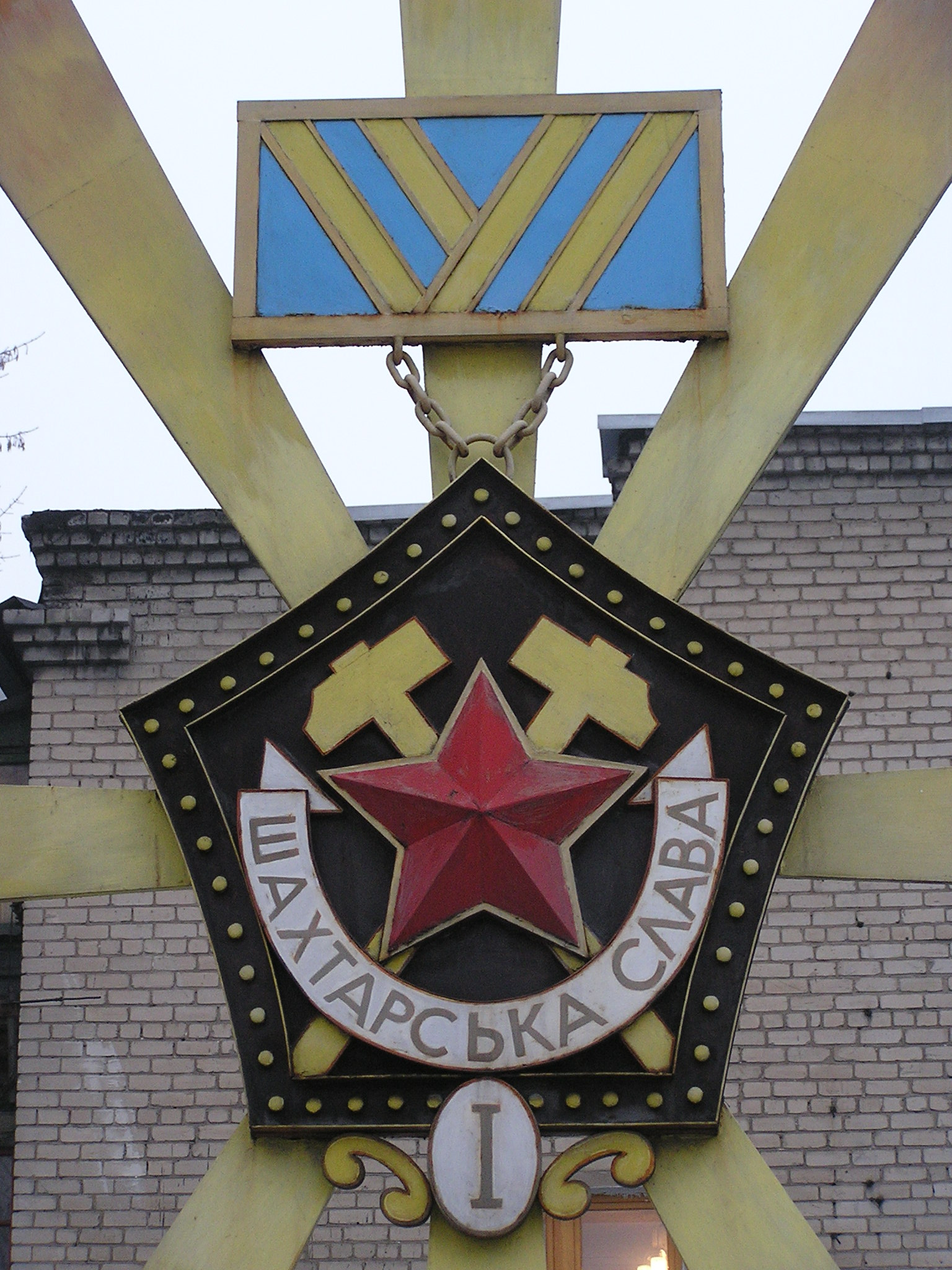 Донецк. Шахта Засядько.